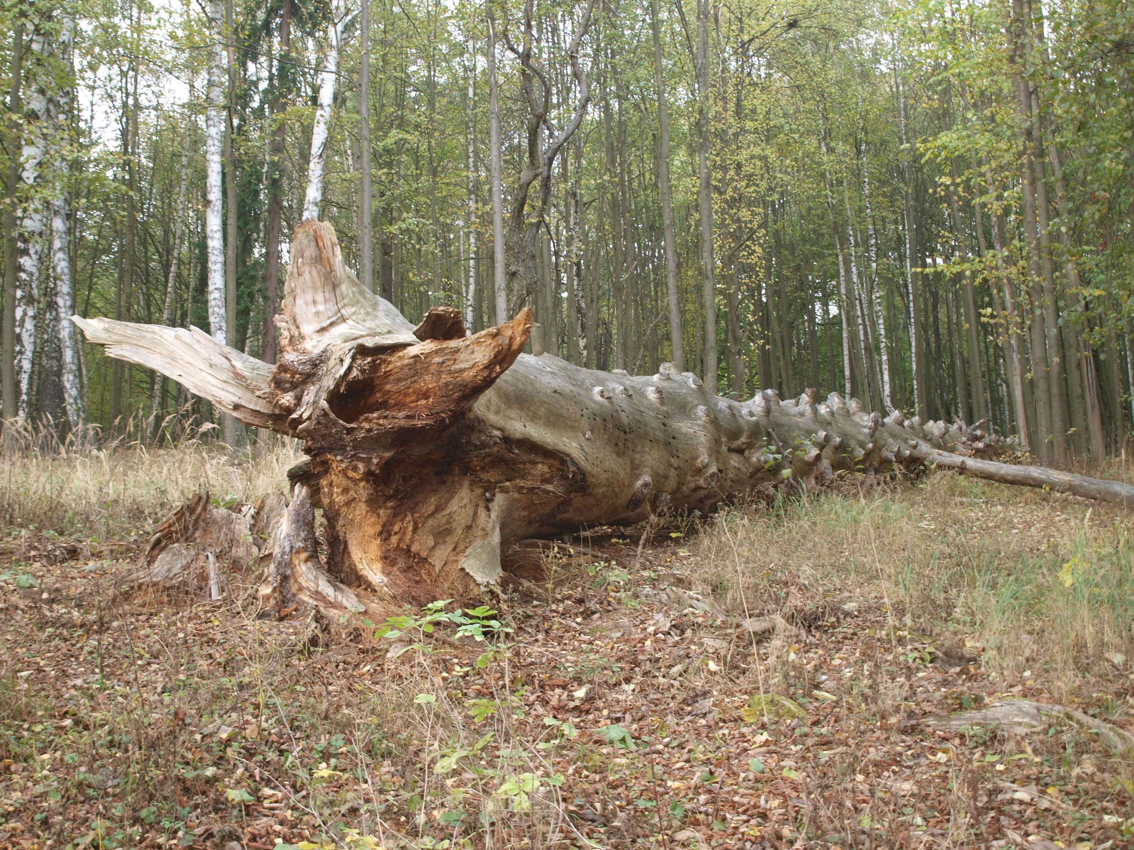 Torzo smrku J. E. Chadta v Lysické oboře